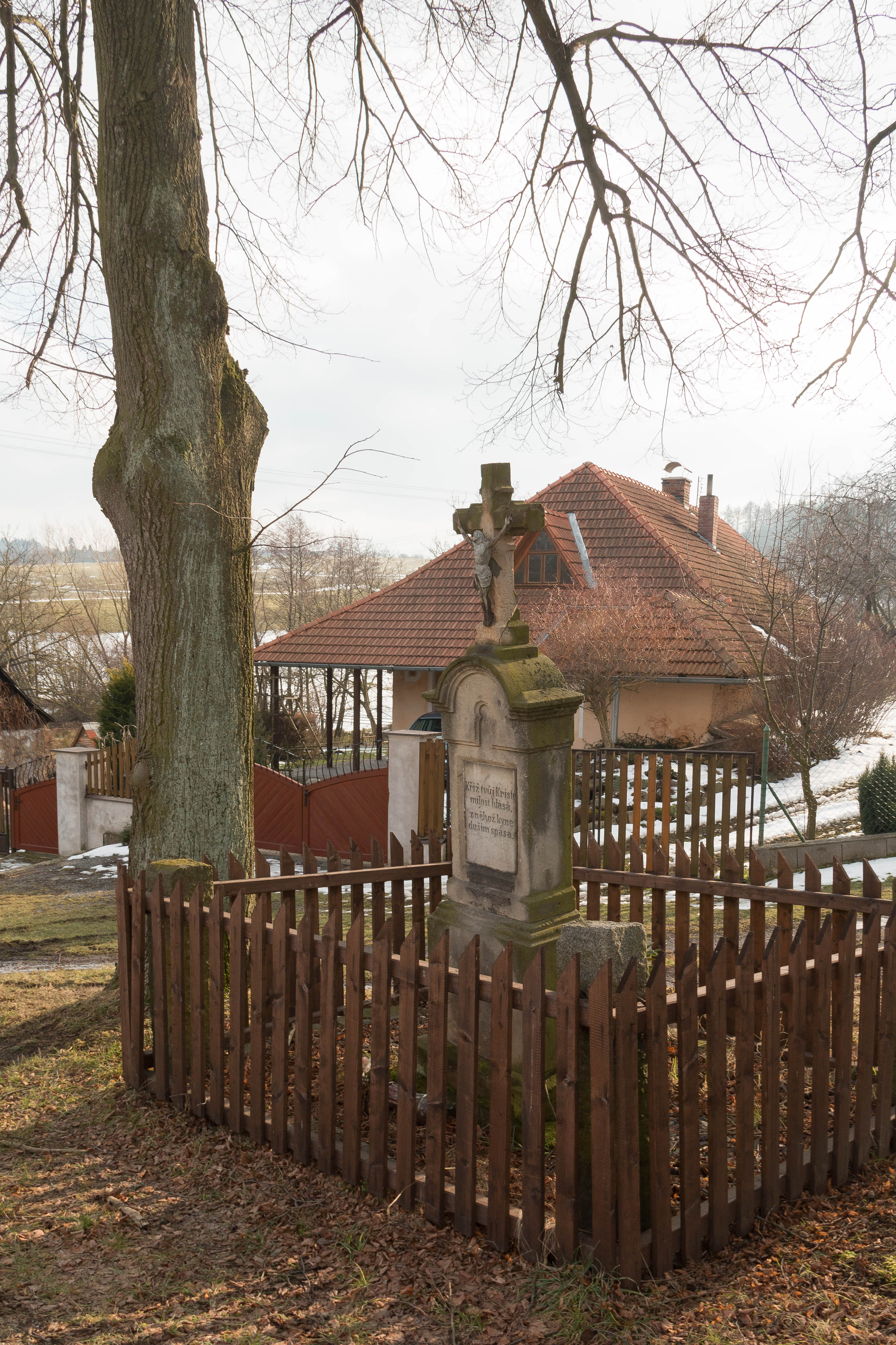 Bratroňov u Ctětína křížek